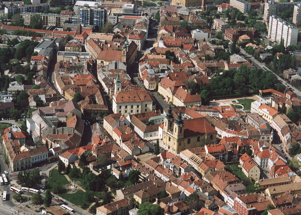 Székesfehérvár - Fejér megye - Hungary - Europe